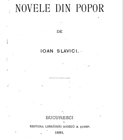 Coperta volumului Novele din popor, publicat în 1881 de Ioan Slavici